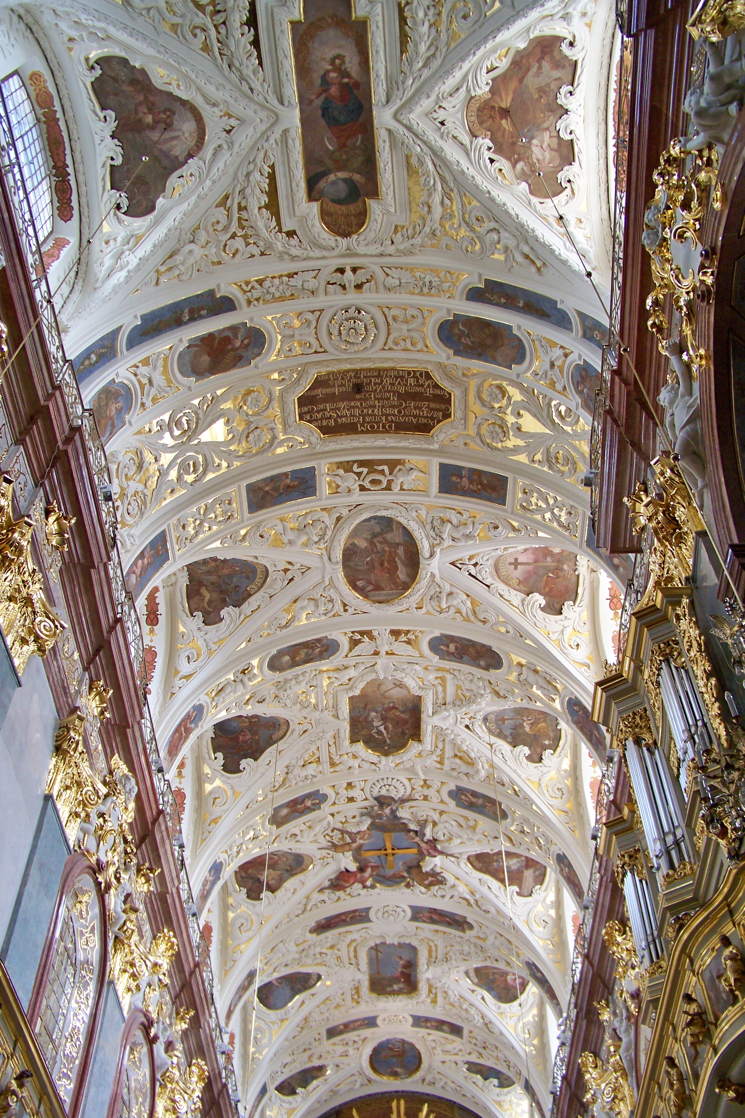 Zespół Klasztorny o.o. Paulinów na Jasnej Górze. Wnętrze Bazyliki.